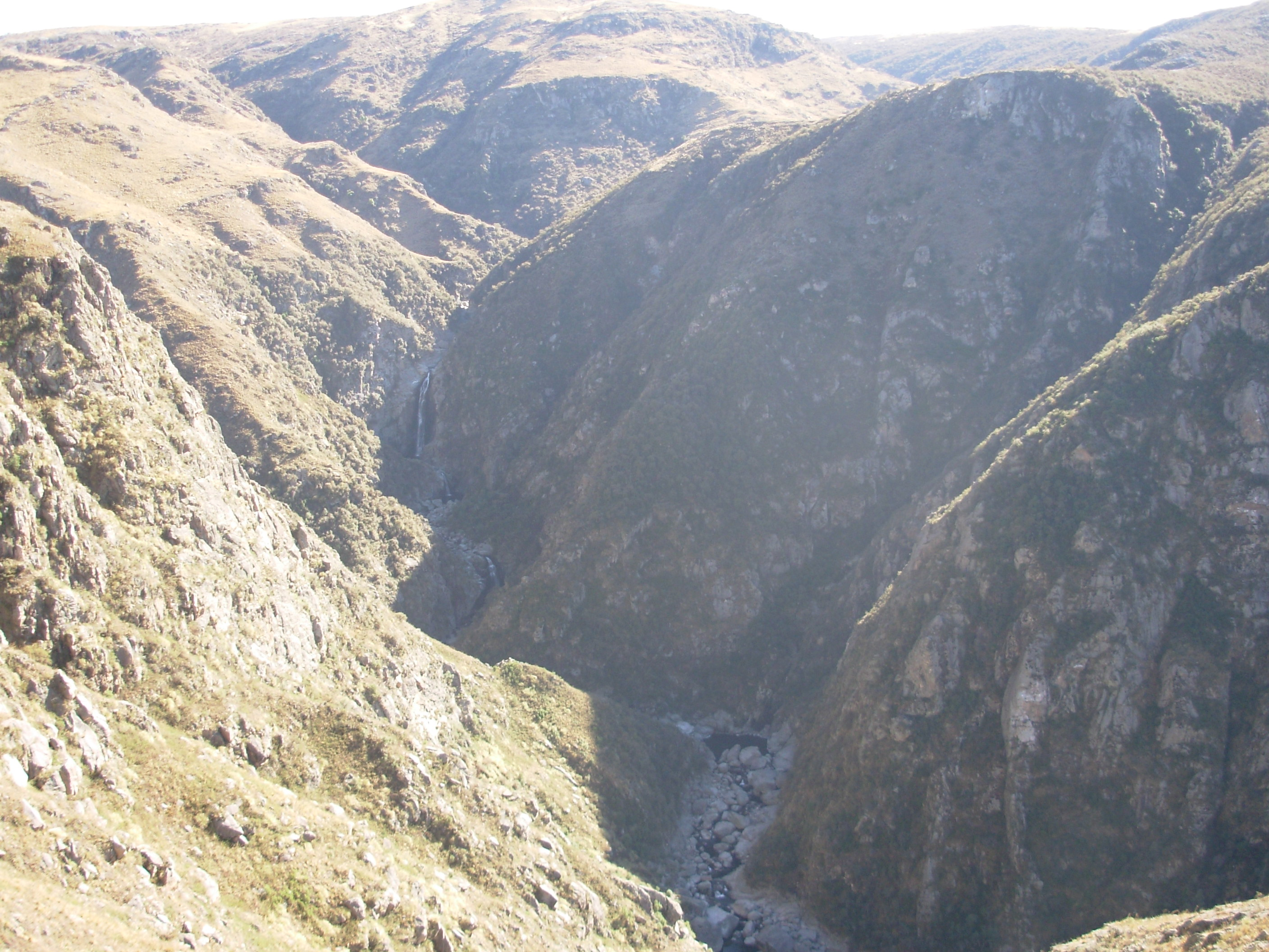 Vista de la Qubrada de Yatán